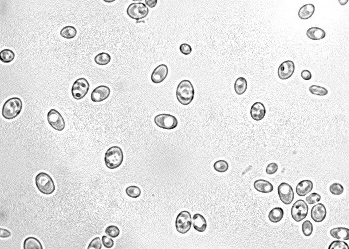 Kvasinky pivní